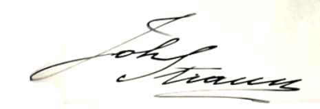 Johann Eduard Strauss Komponist (1866-1939)